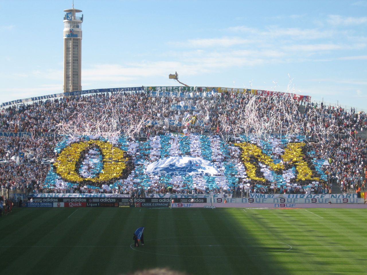 Tifo du Virage Nord du Stade Vélodrome lors du match OM-Le Mans